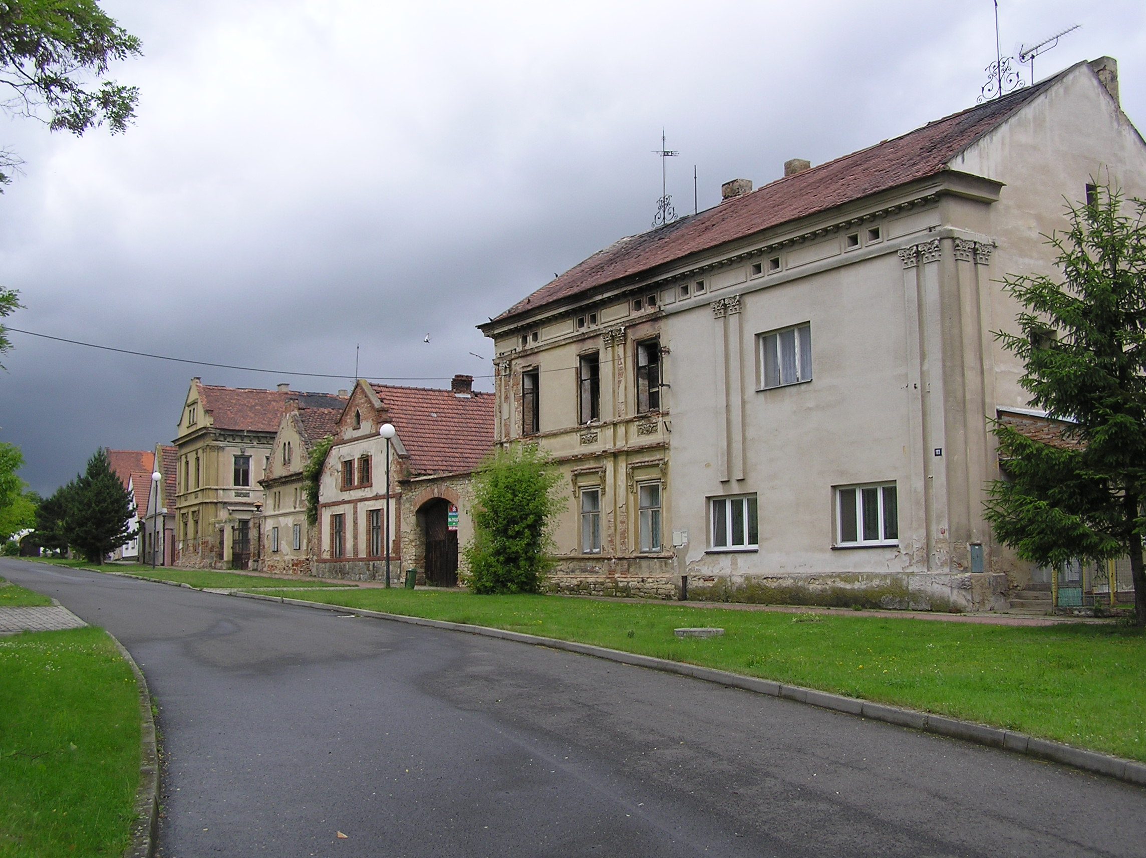 Village square in Výškov